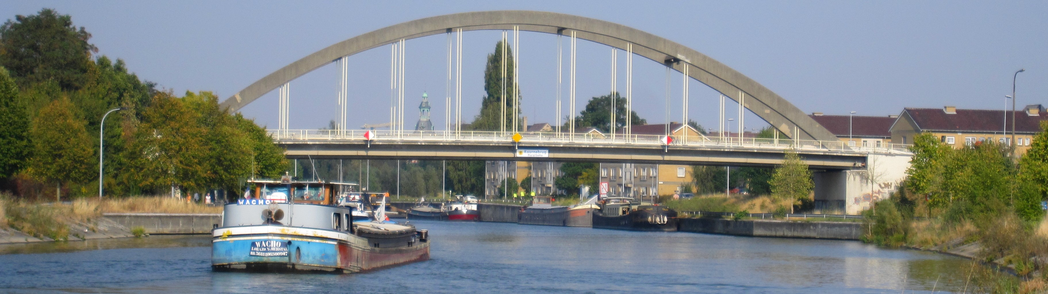 Vue panoramique d'Harelbeke